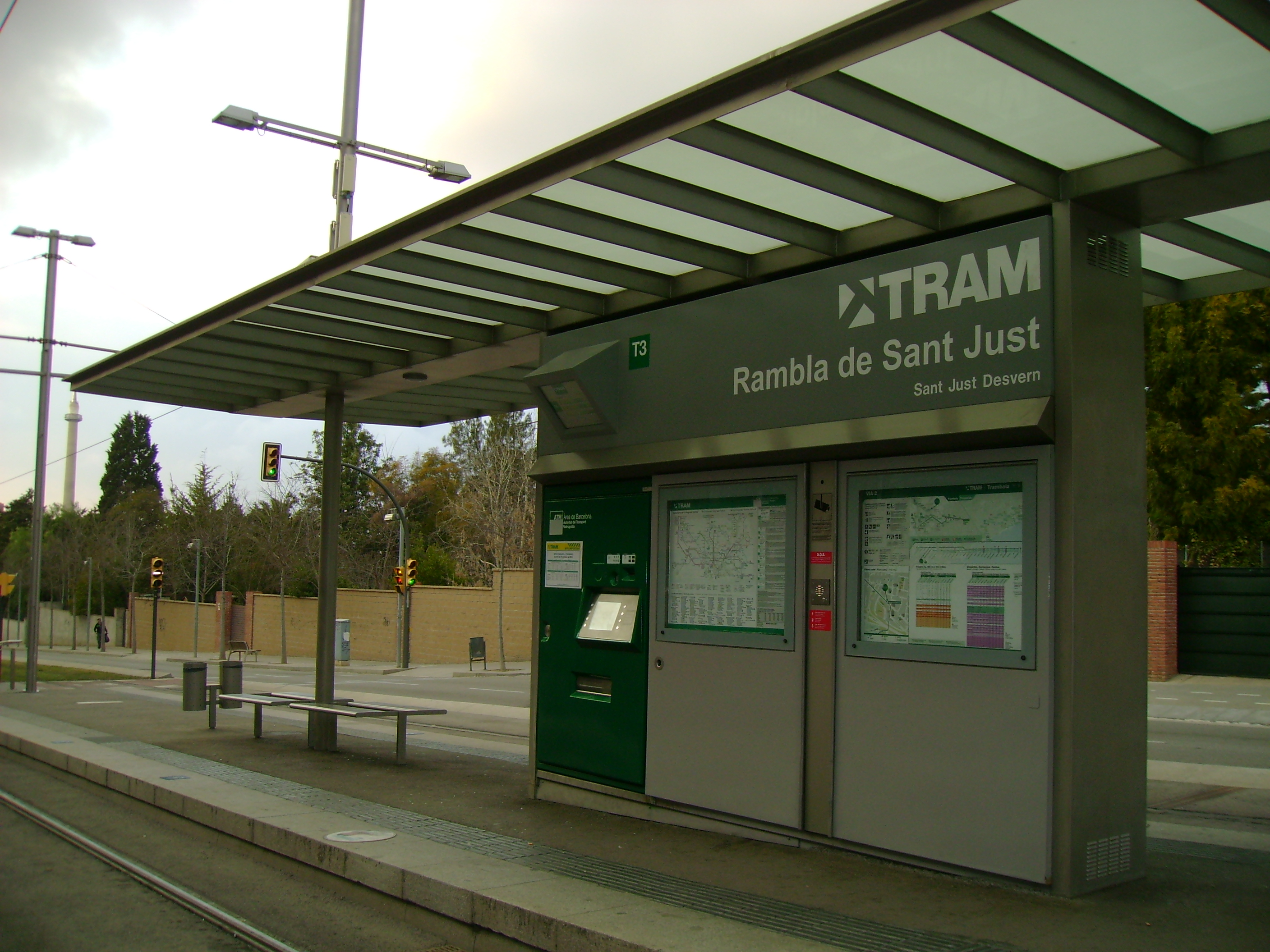 Foto capturada per la meva càmara a l'estació de Rambla de Sant Just (Trambaix).